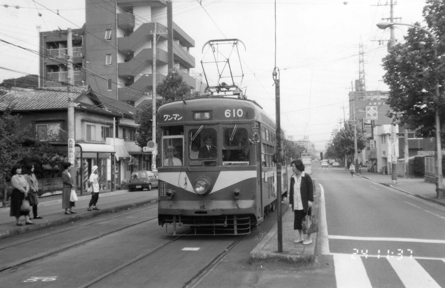 遊園前バス営業所停留場に停車中の610号（1992年10月24日）